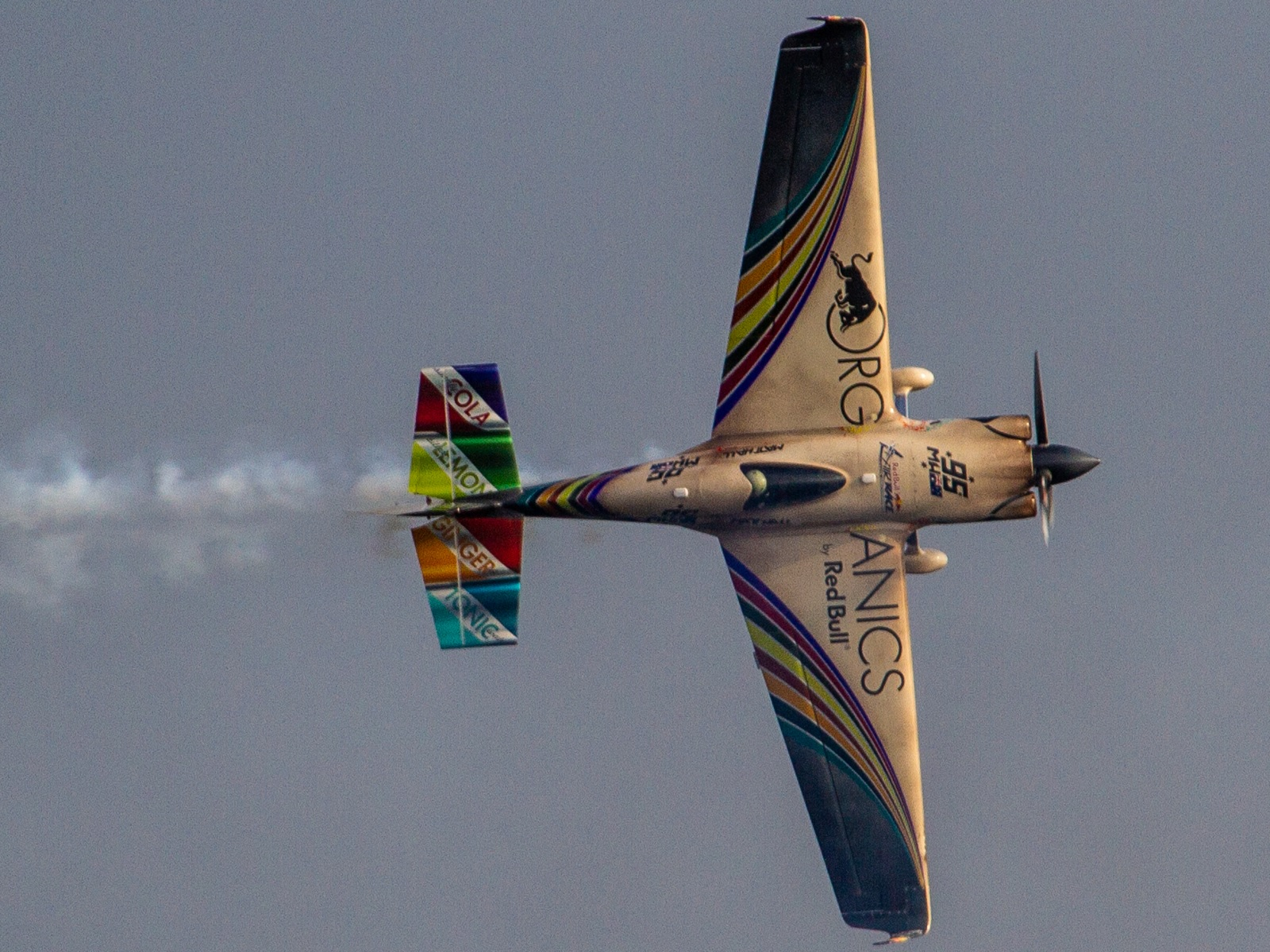 2018年レッドブル・エアレース・ワールドシリーズ 千葉 マットホール Final4